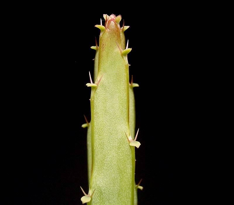 Euphorbia taruensis